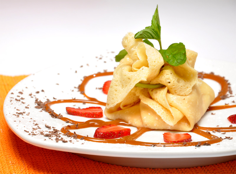 Aumonière de confiture de lait, fraise et copeaux de chocolat de la crêperie "La Crepa Loca", Xela, Guatemala.